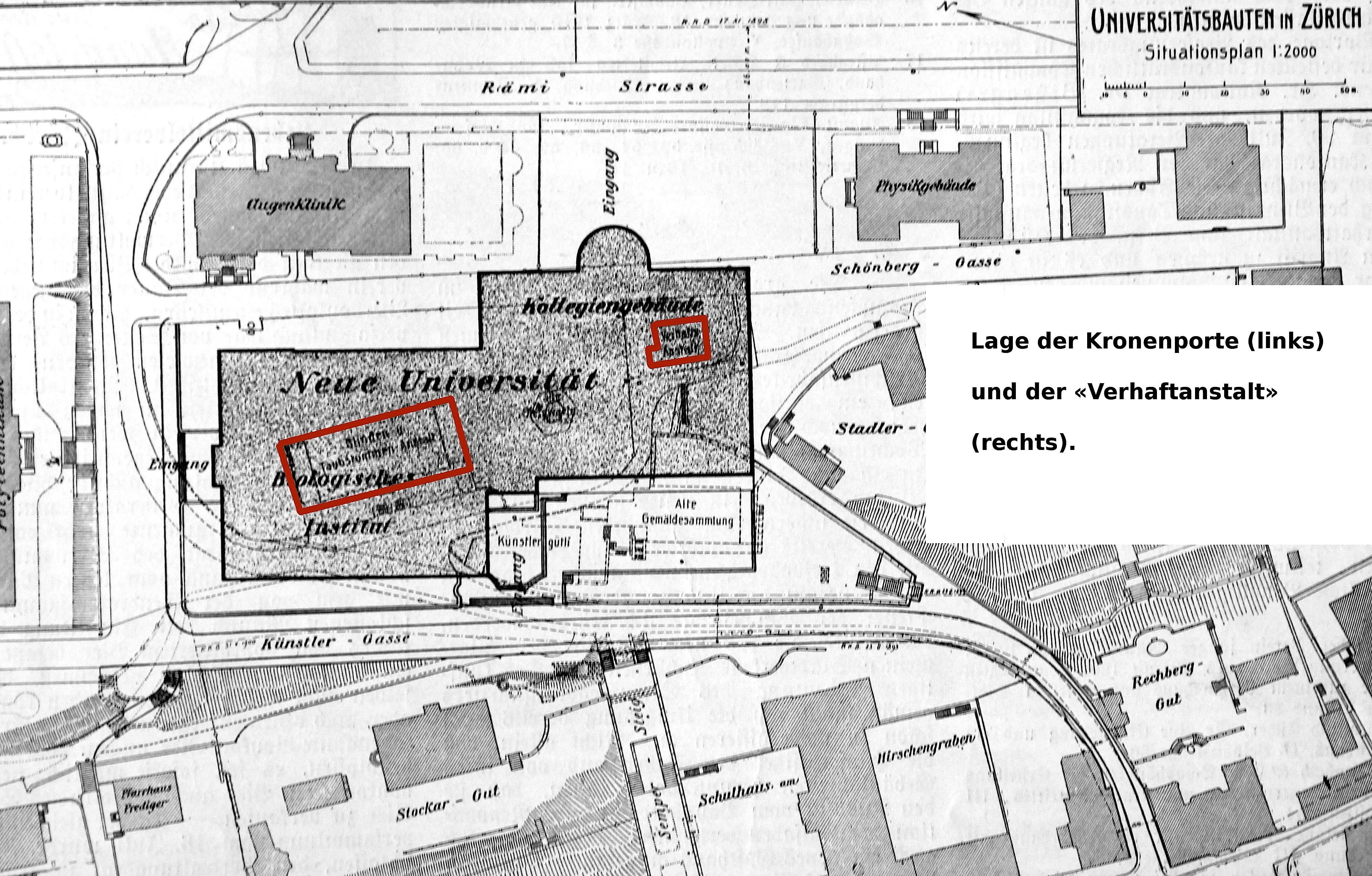 Frühere Lage der Kronenporte an der Stelle der heutigen Uni